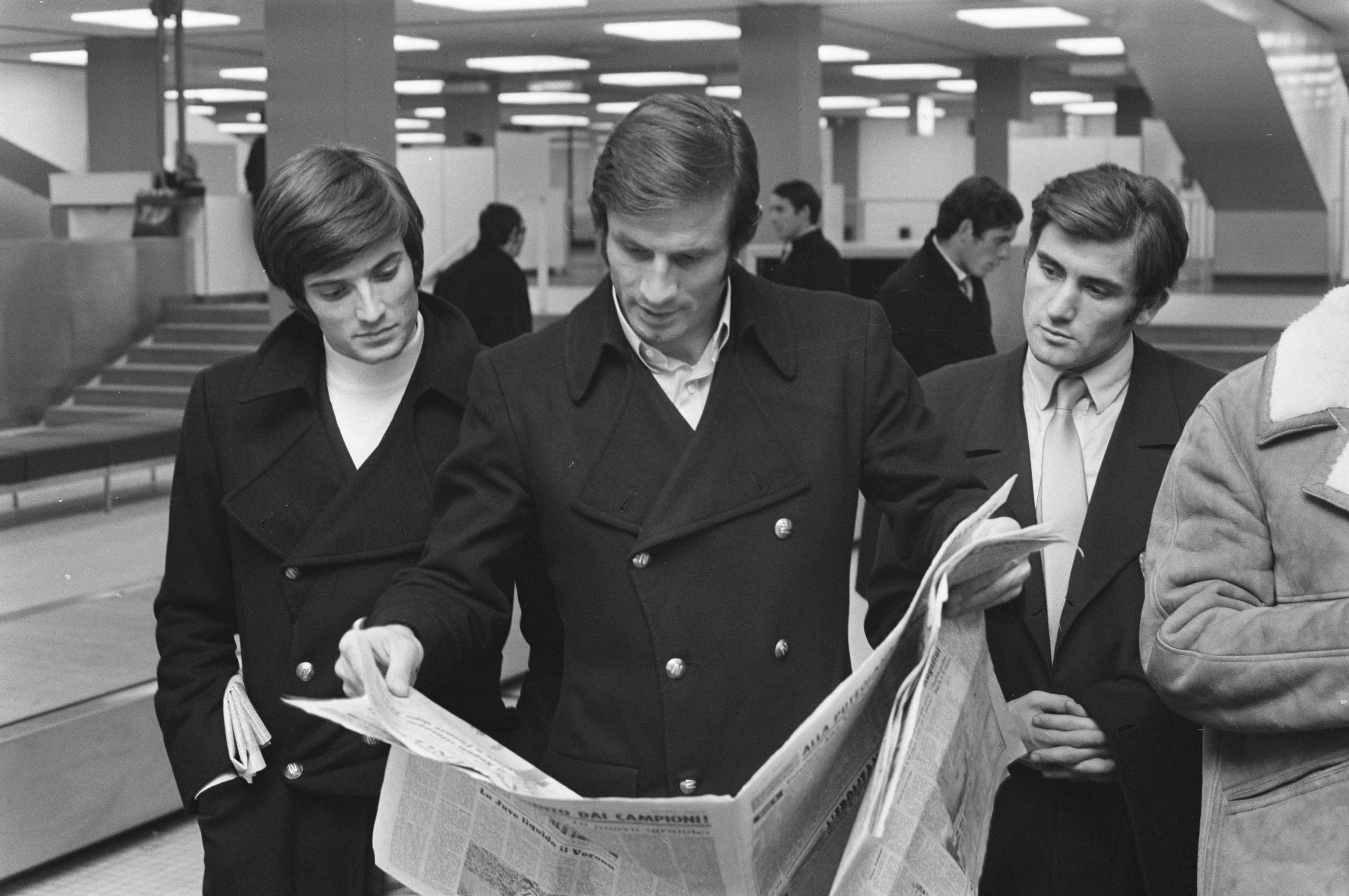 Collectie / Archief : Fotocollectie Anefo Reportage / Serie : [ onbekend ] Beschrijving : Voetbal elftal van Napoli arriveert op Schiphol voor wedstrijd tegen Ajax. Dino Panzanato (midden) leest een Italiaanse krant [links Juliano?, Datum : 19 januari 1970 Locatie : Noord-Holland, Schiphol Trefwoorden : elftallen, sport, voetbal Persoonsnaam : Panzanato, Dino Instellingsnaam : Napoli Fotograaf : Evers, Joost / Anefo Auteursrechthebbende : Nationaal Archief Materiaalsoort : Negatief (zwart/wit) Nummer archiefinventaris : bekijk toegang 2.24.01.05 Bestanddeelnummer : 923-1740